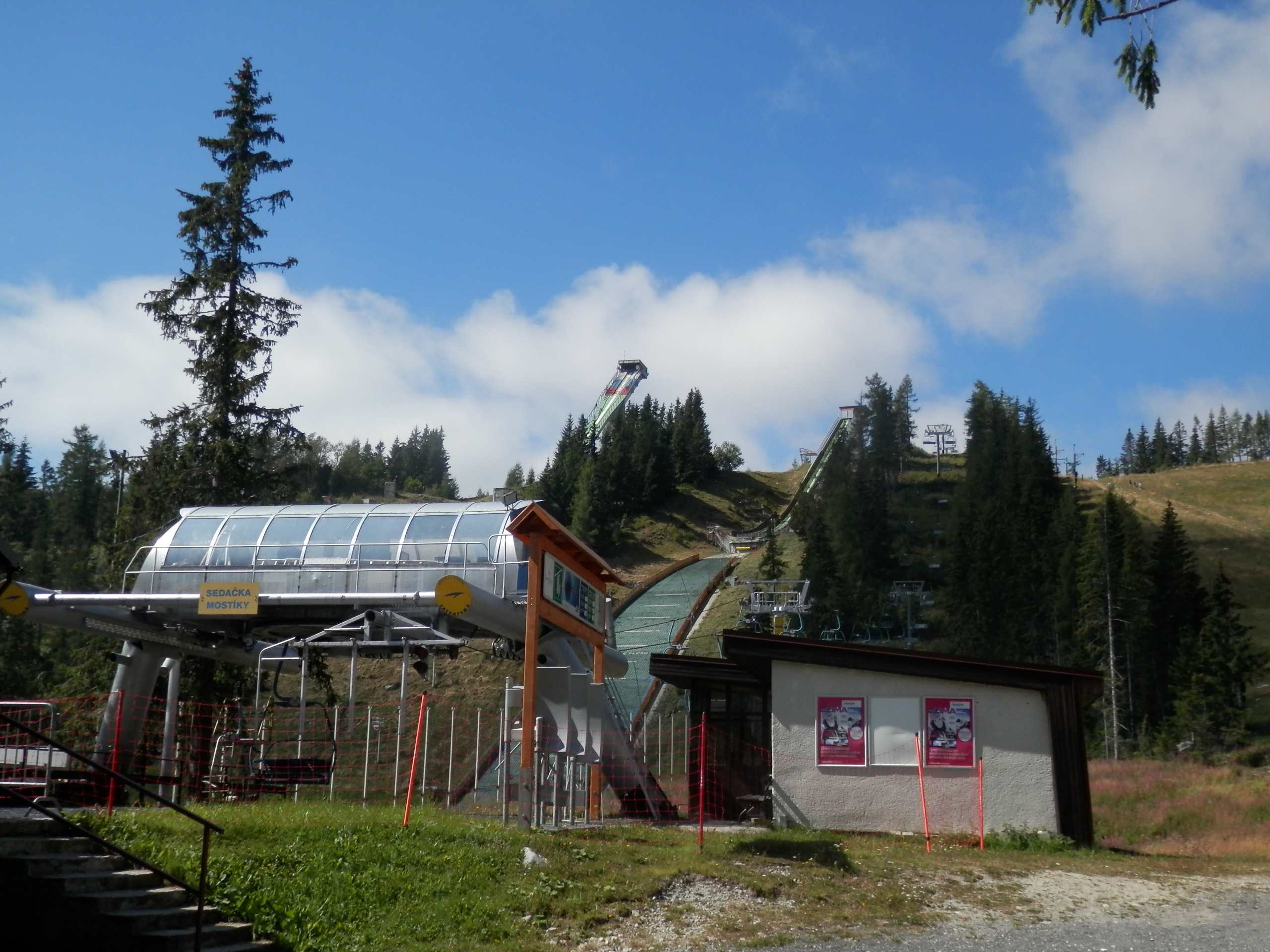 Lyžiarsky areál FIS. Vysokohorská osada s názvom Štrbské Pleso. Leží v nadmorskej výške asi 1 350 metrov. Obec Štrba, okres Poprad. Leto 2016